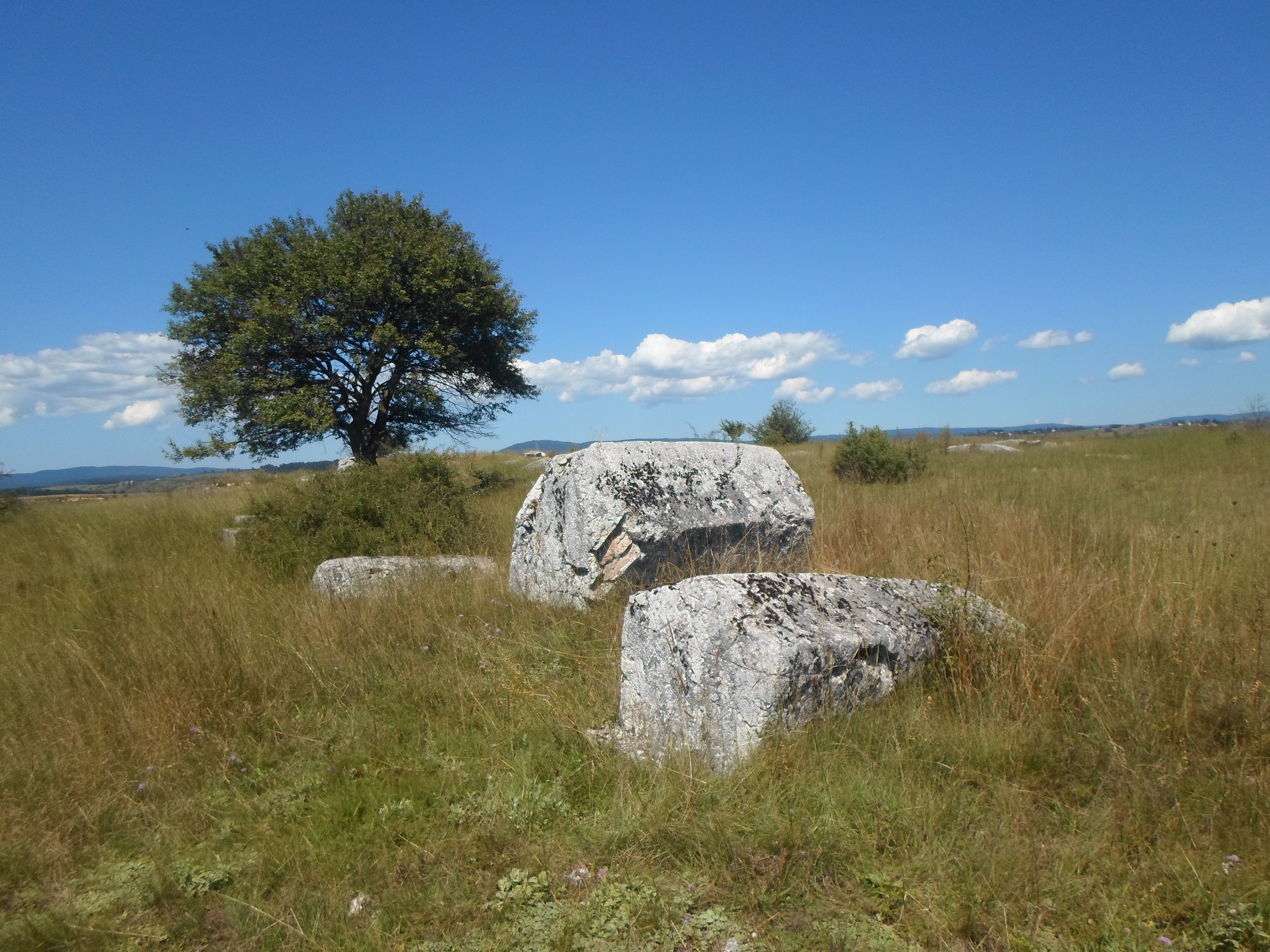 Праисторијски тумулуси и некрополе са стећцима, Лубурића поље This image was uploaded as part of Trace of Soul 2016.